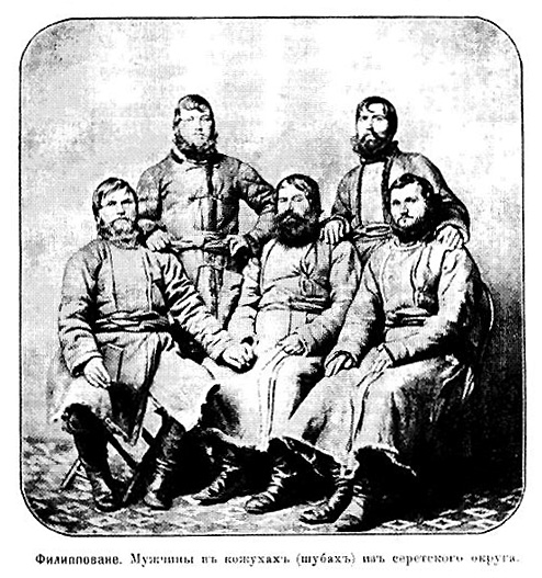 Липоване, 19 век